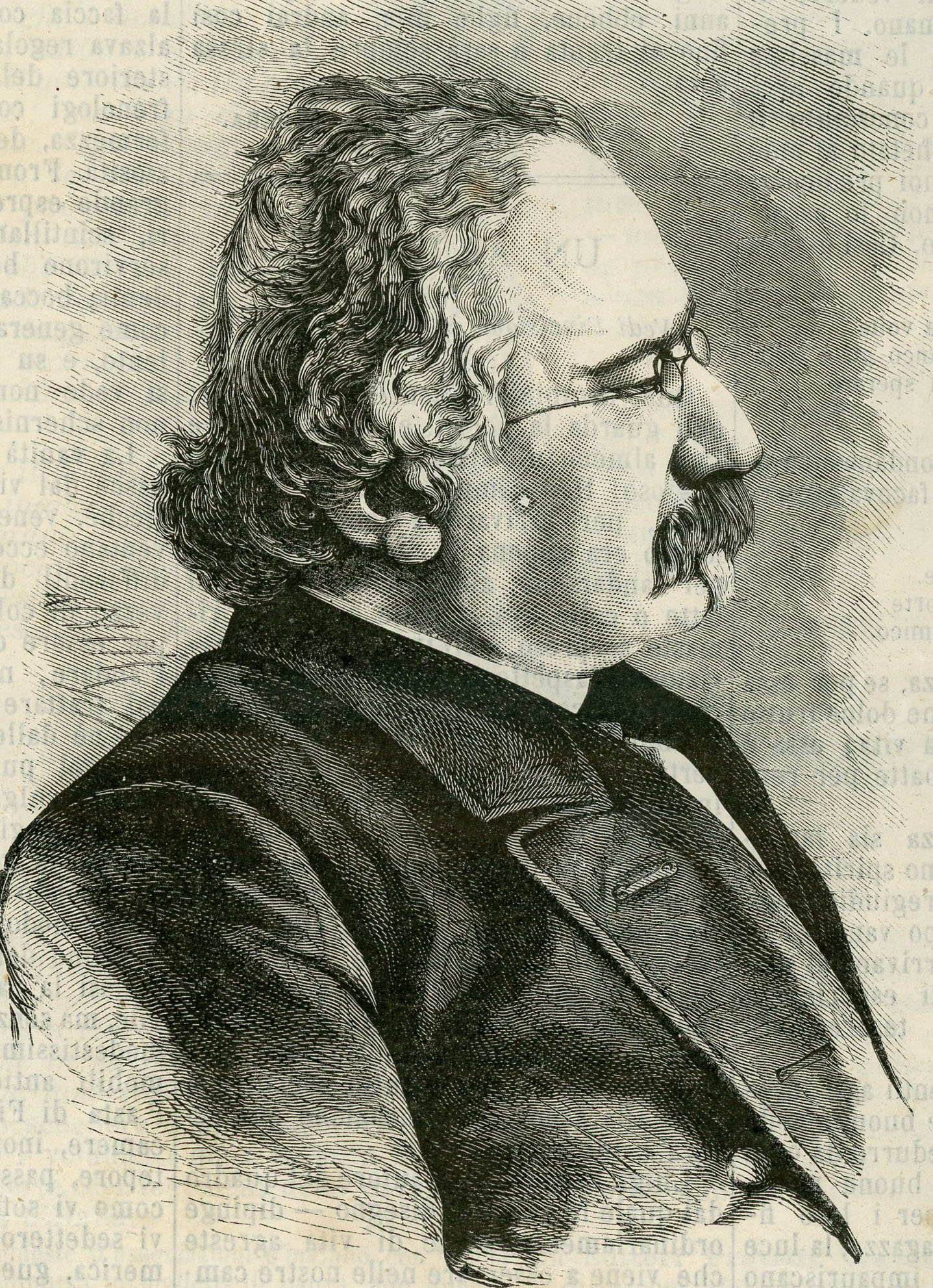 Silvio Spaventa, deputato di Bergamo. Deputati al Parlamento Italiano (xilografia).